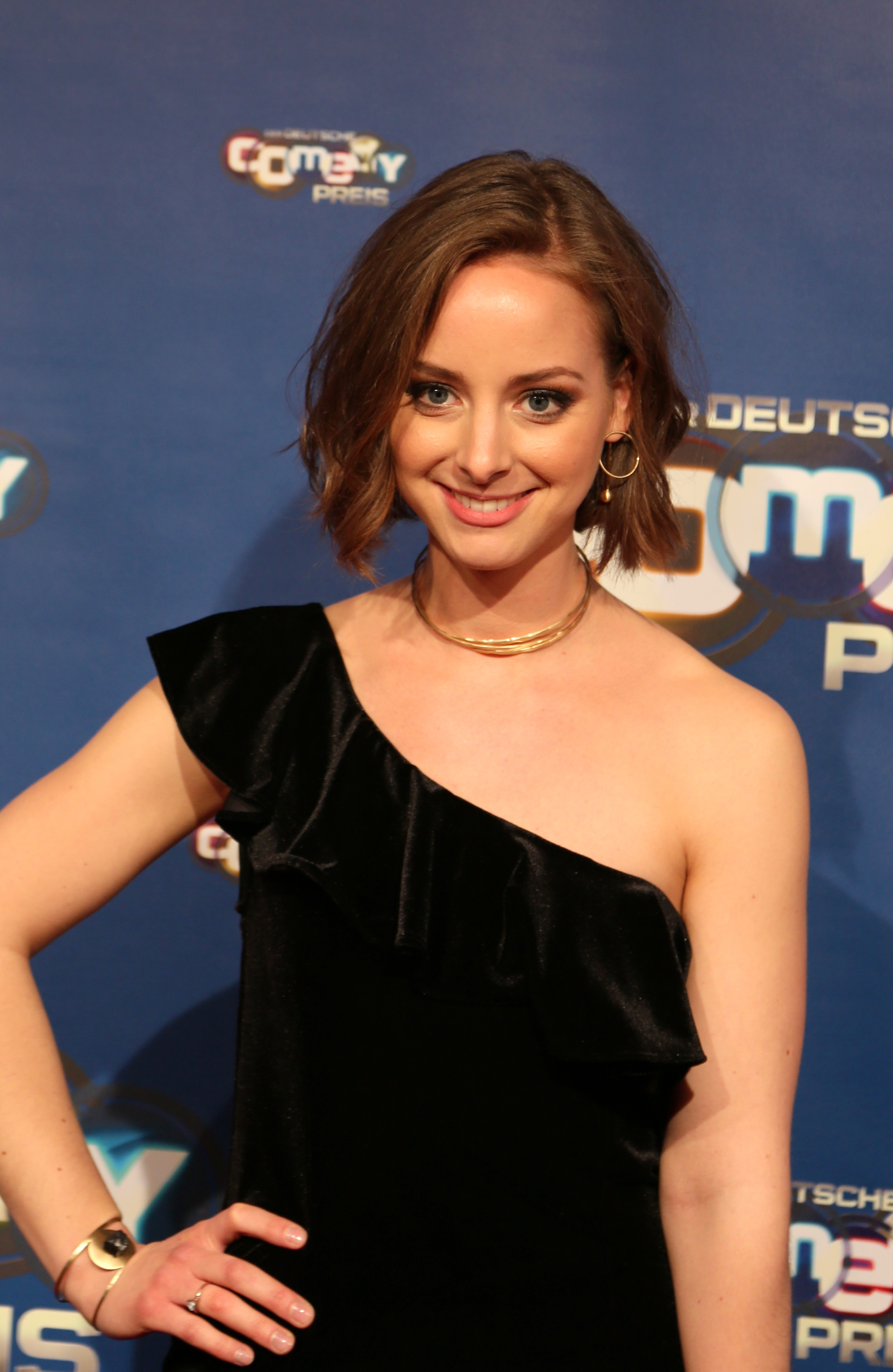 Deutscher Comedypreis 2017.